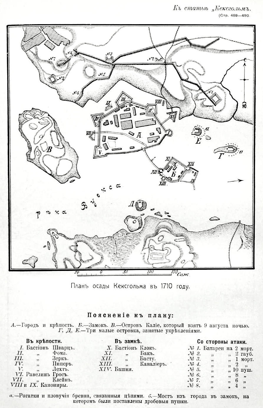 План осады Кексгольма в 1710 году. Это изображение было использовано для иллюстрирования статьи «Кексгольм» опубликованной в двенадцатом томе «Военной энциклопедии», который был издан книгоиздательским товариществом И. Д. Сытина в 1913 году в столице Российской империи городе Санкт-Петербурге. Более подробное описание к этой картинке можно прочесть в указанной выше статье. Данную карту в большем разрешении, но без описания на картинке можно увидеть здесь. План осады Кексгольма в 1710 году. Пояснения к плану: А - город и крепость; Б - замок; В - остров Калие, который взят ночью 9 августа; Г; Д; Е - три малых острова занятые укреплениями. В крепости: I - бастион Шварц; II - бастион Фома; III - бастион Зерк; IV - бастион Нипер; V - бастион Лехт; VI - равелин Грос; VII - равелин Клейн; VIII и IX - капониры В замке: X - бастион Клок; XI - бастион Бак; XII - бастион Басту; XIII - бастион Кавалиер; XIV - башня; Со стороны атаки: №1 - батарея на 2 мортиры; №2 - батарея на 2 гаубицы; №3 - батарея на 1 мортиру; №4 - батарея на 2 мортиры; №5 - батарея на 10 пушек; №6 - батарея на 8 пушек; №7 - батарея на 6 пушек; №8 - батарея на 4 пушек; а - рогатки и плавучие бревна связанные цепями; б - мост из города в замок, на котором были поставлены дробовые пушки.